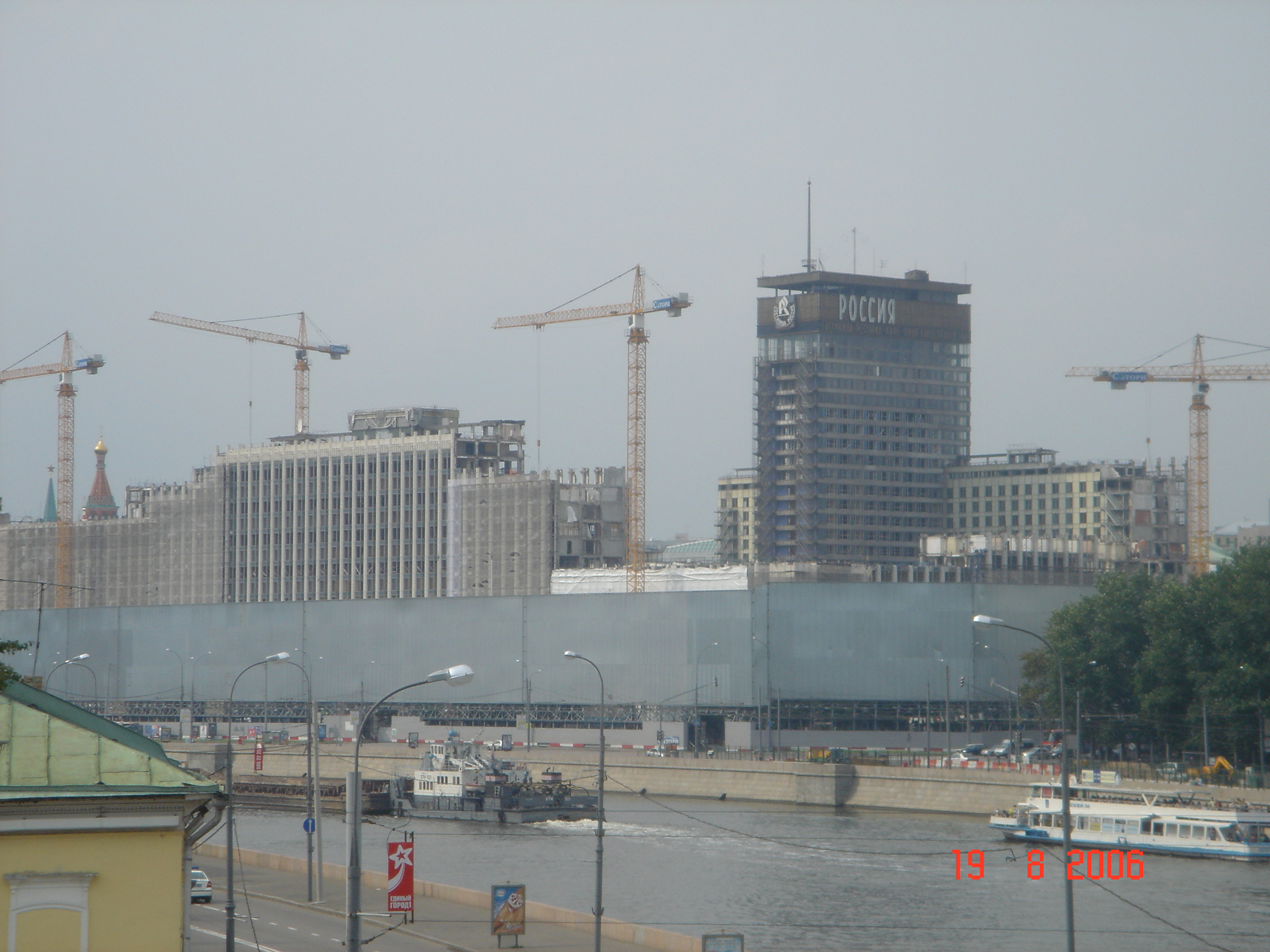 А вот это раритет - разрушаемая гостиница Россия